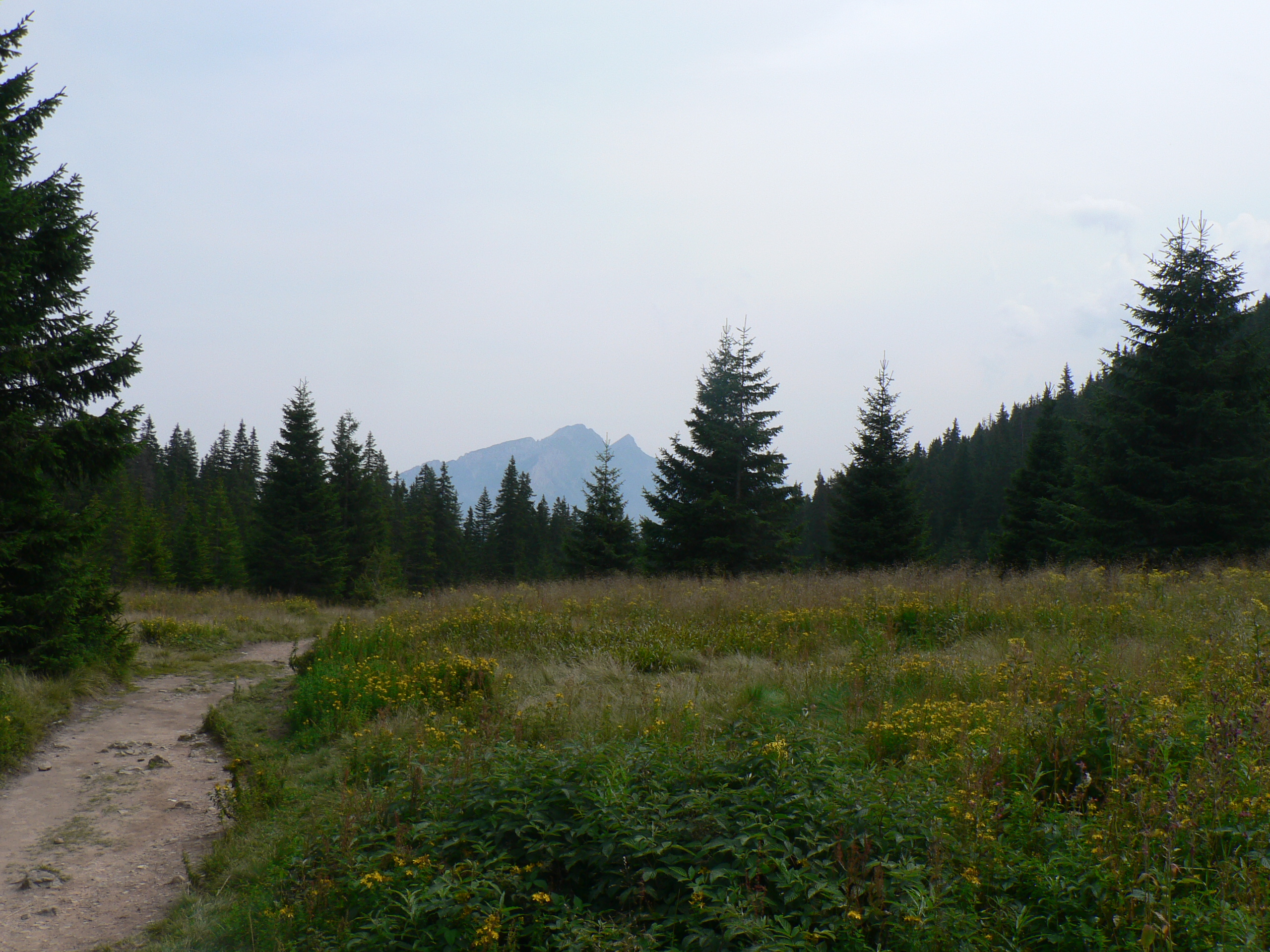 Rówień Waksmundzka, w tle Tatry Bielskie